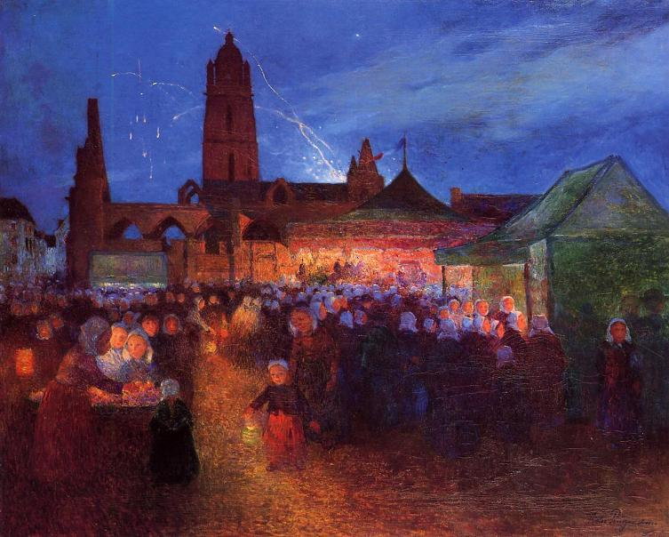 painting: oil